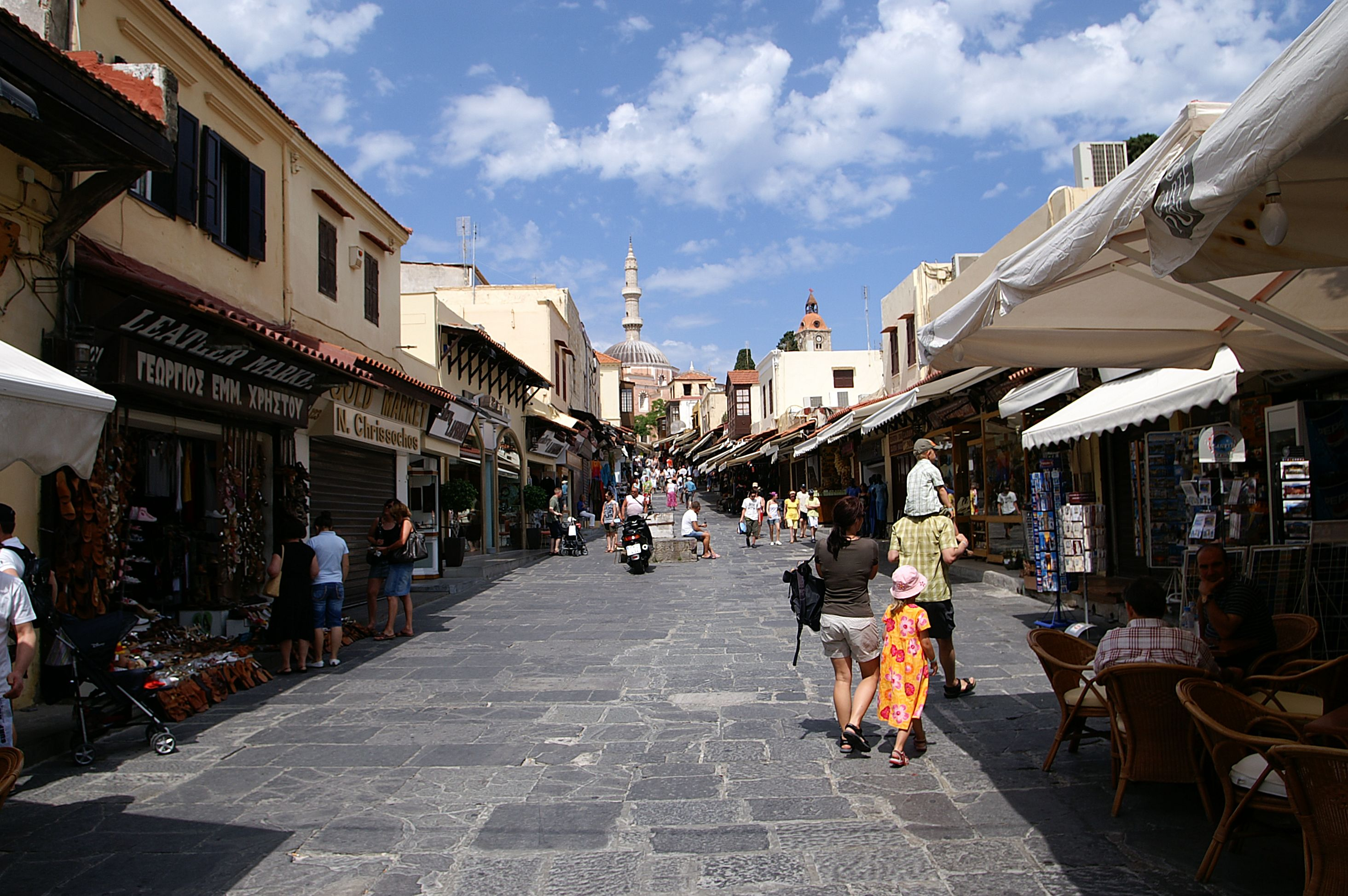 Gasse in der Altstadt von Rhodos.